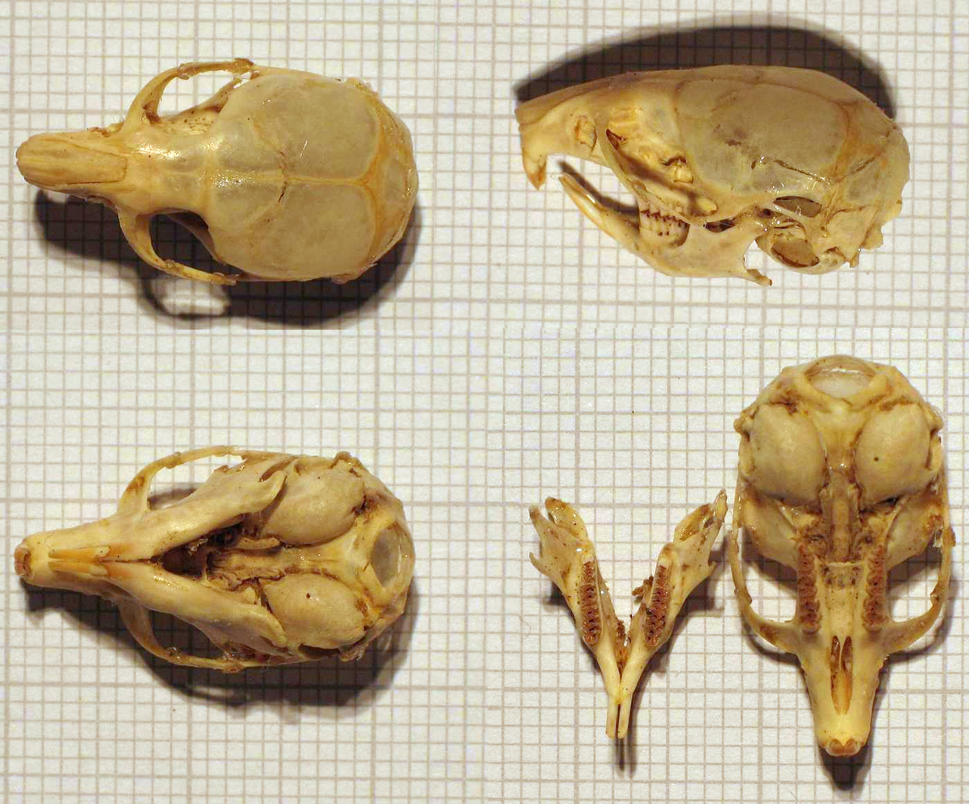 Schädel einer Rötelmaus aus mehreren Perspektiven, präpariert Anfang der 1990er und fotografiert im Dezember 2004 von Soebe Titel: Rötelmausschädel (Myodes glareolus) Foto: soebe, 08.12.2004 Lizenz: GNU-FDL Beschreibung: Im Rahmen einer Studienarbeit von mir Anfang der 1990er Jahre präparierter Schädel einer Rötelmaus first upload in de wikipedia on 00:46, 8. Dez 2004 by Soebe